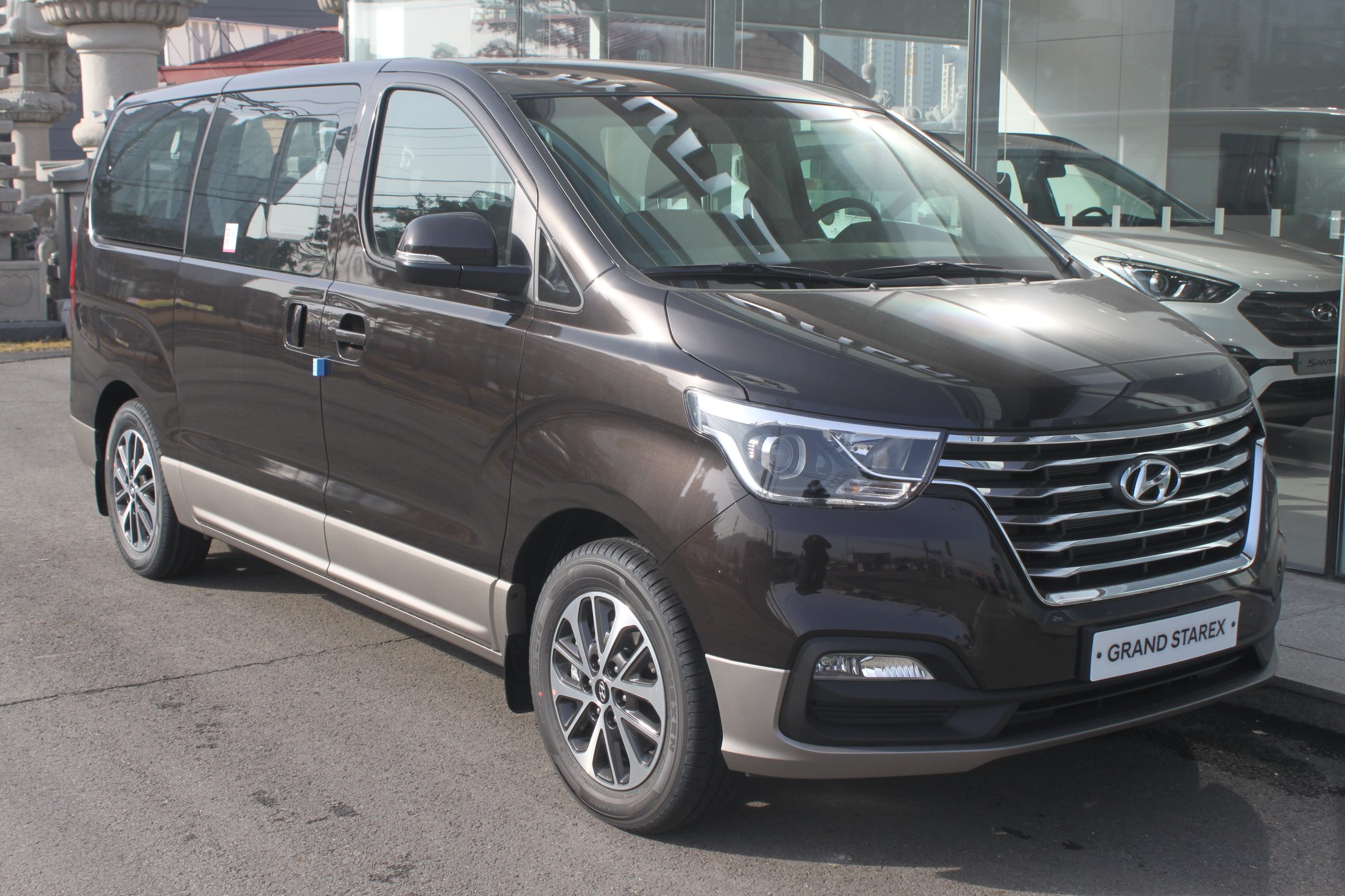 현대 더 뉴 그랜드 스타렉스 정측면(9인승 어반)